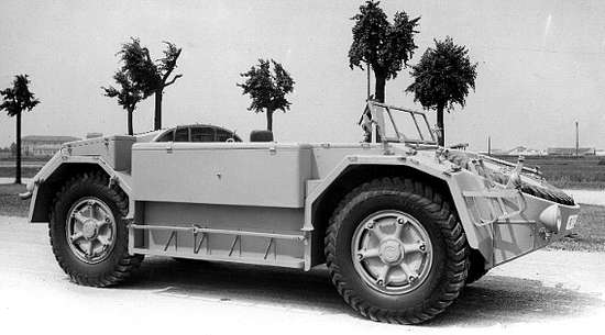 AS42 metropolitana fabbrica